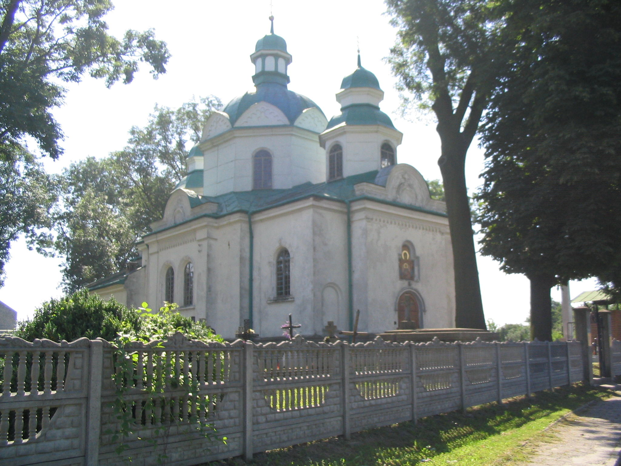 Cerkiew Zaśnięcia NMP, ul. Wilczańska, Przemyśl, Polska Author: Goku122